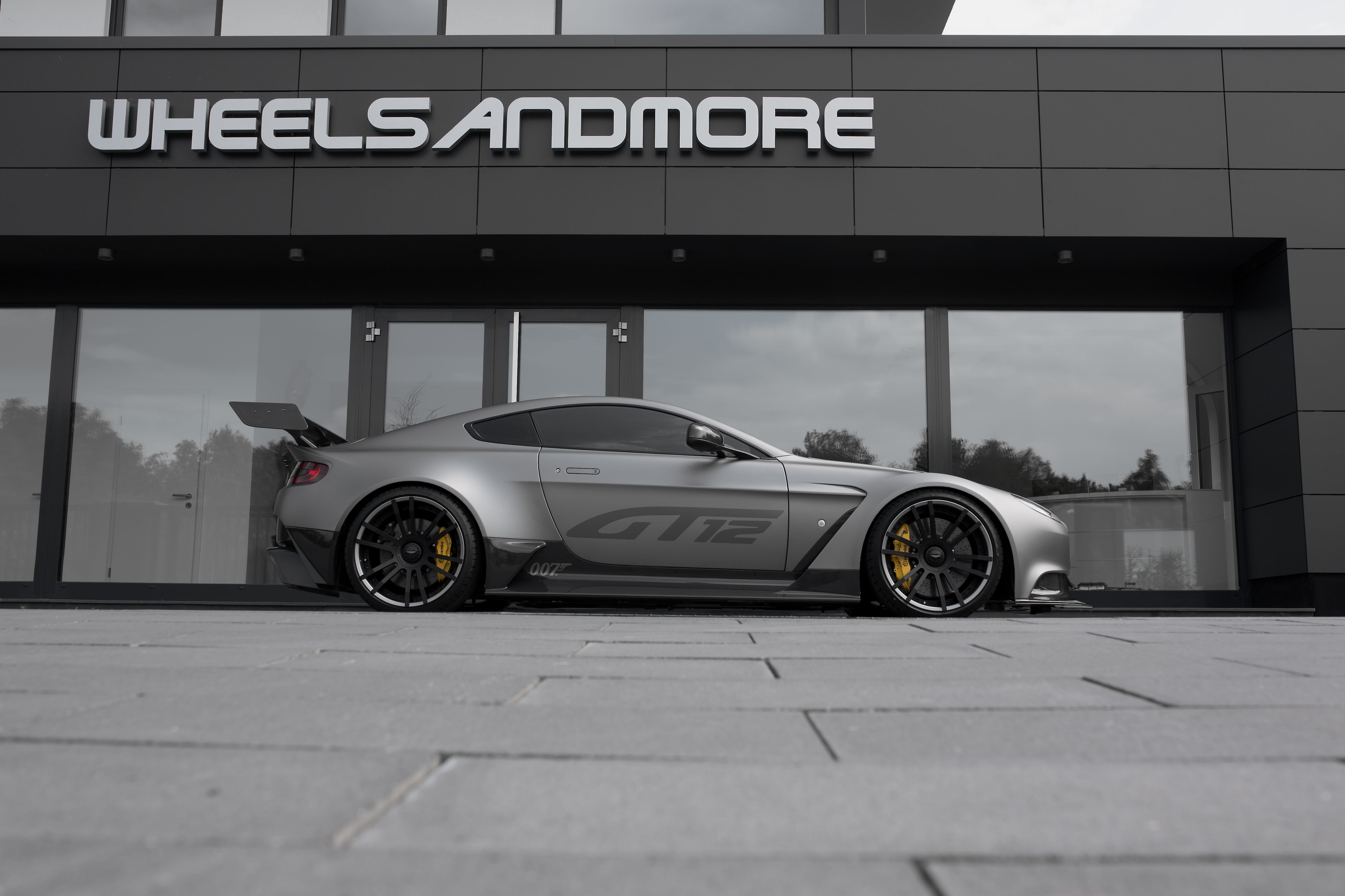 In Handarbeit angefertigte Felgen für Aston Martin GT12